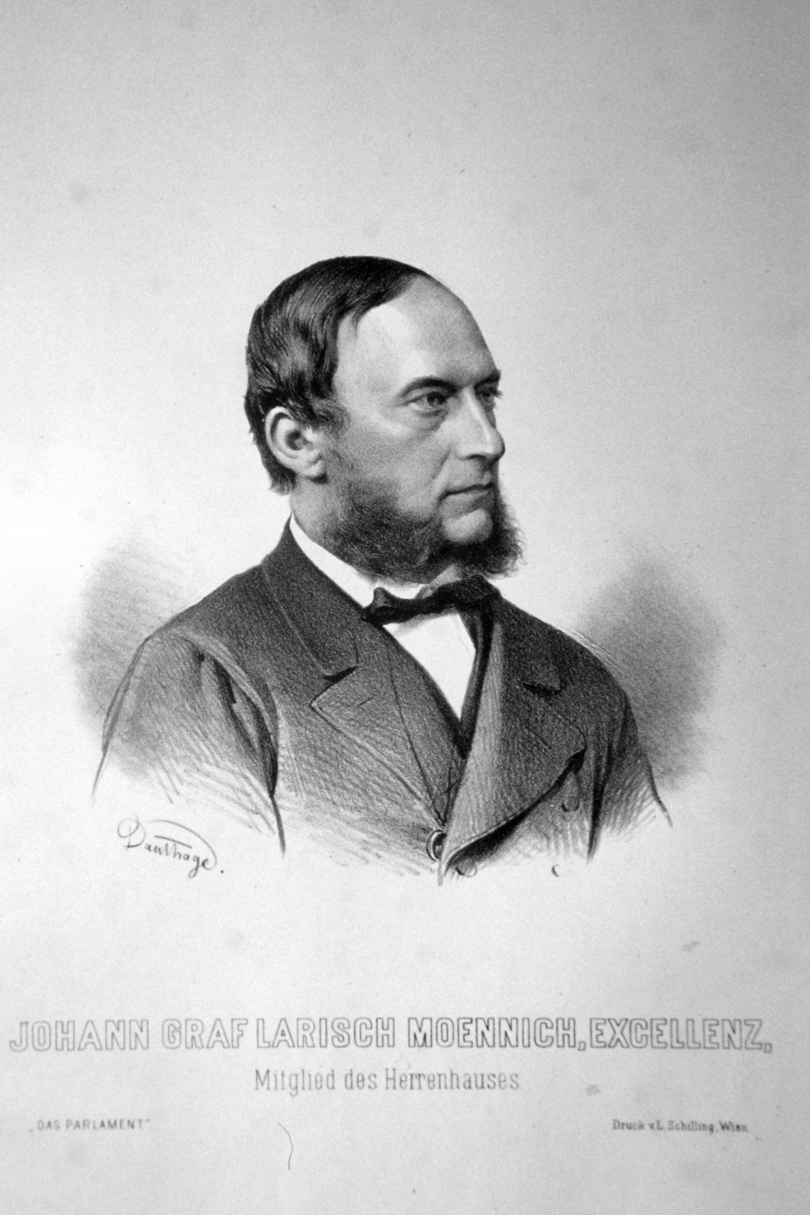 Johann Larisch-Moennich (1821-1884), Graf, Großgrundbesitzer, k. k. Finanzminister.Lithographie von Adolf Dauthage